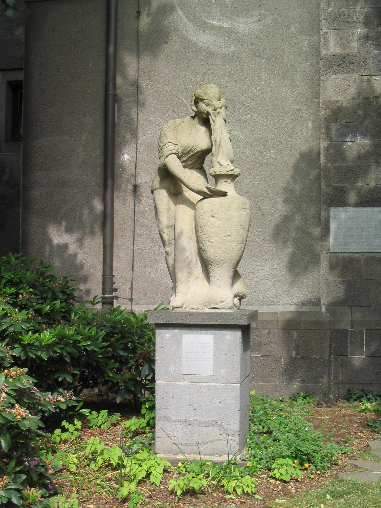 Grünberg, "tear woman"; copy of Samuel Mahls Statue at the grave of "von Reden" // "Tränenweibchen" in Grünberg, Hessen; Kopie des Grabdenkmals "von Reden"; original von Samuel Mahl 1770.